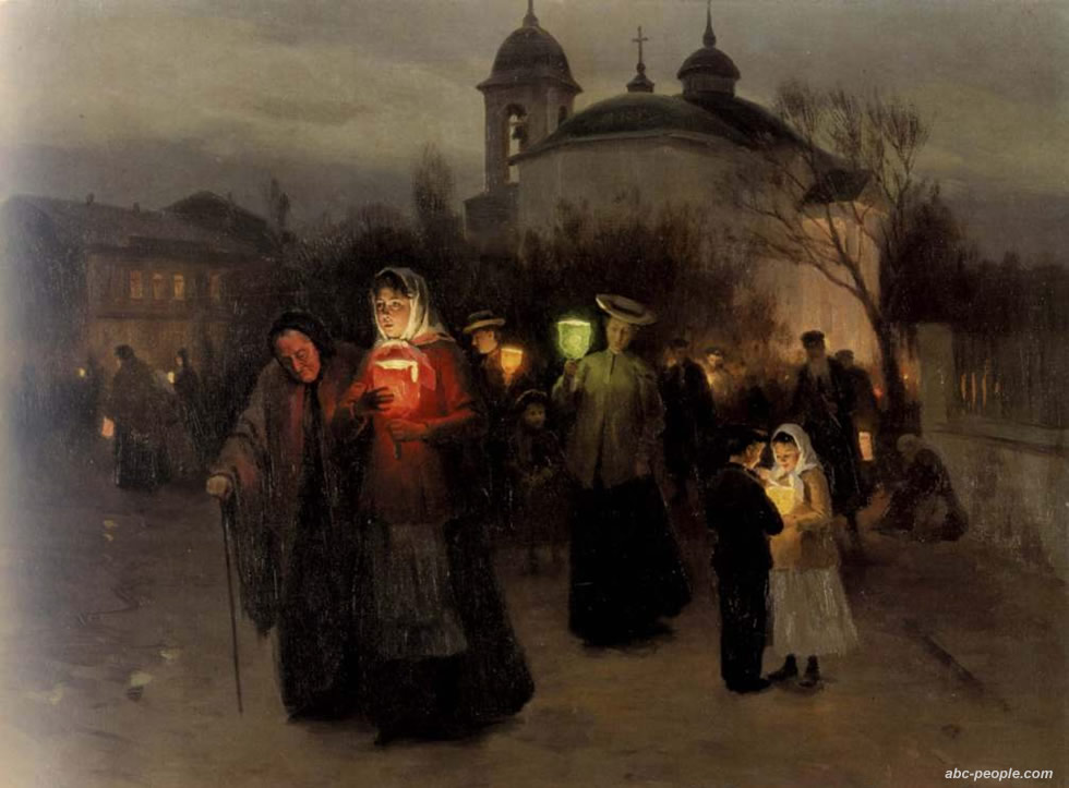 Н. Пимоненко. Страстный четверг.